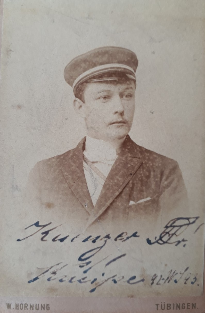 Porträtfotografie von Hermann Emil Kuenzer